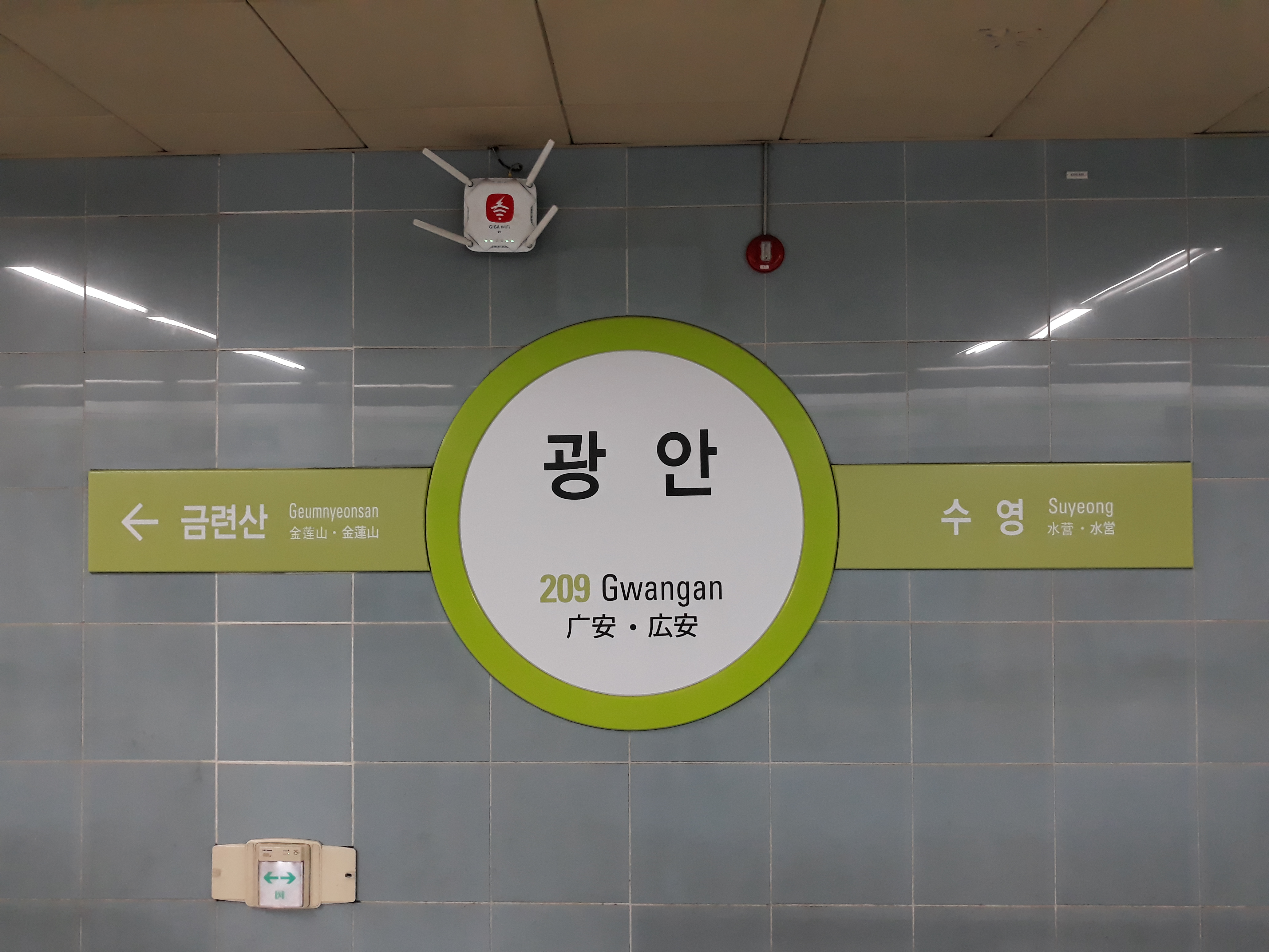 부산 도시철도 2호선 광안역 양산 방면 역명판